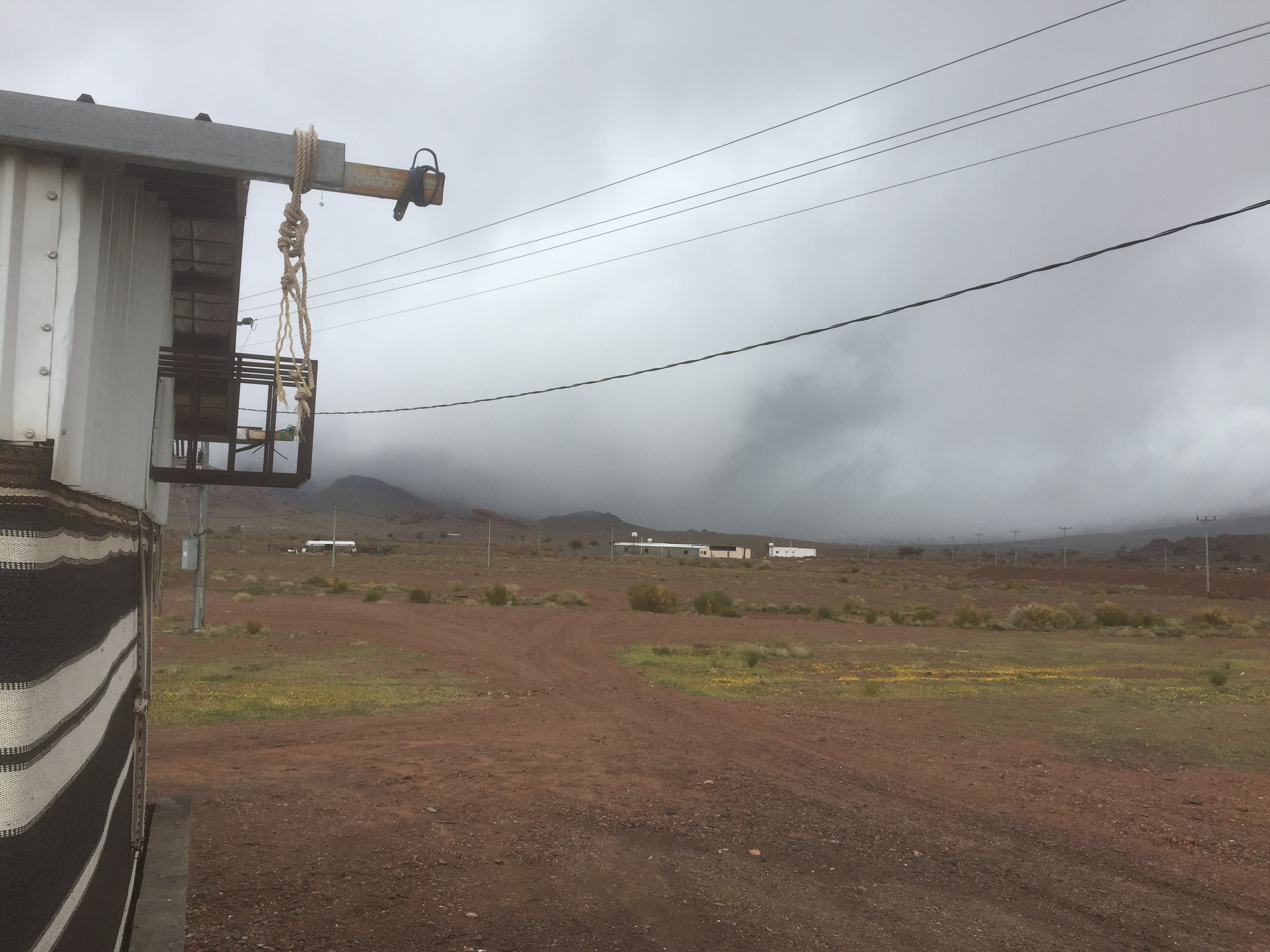 الشتاء